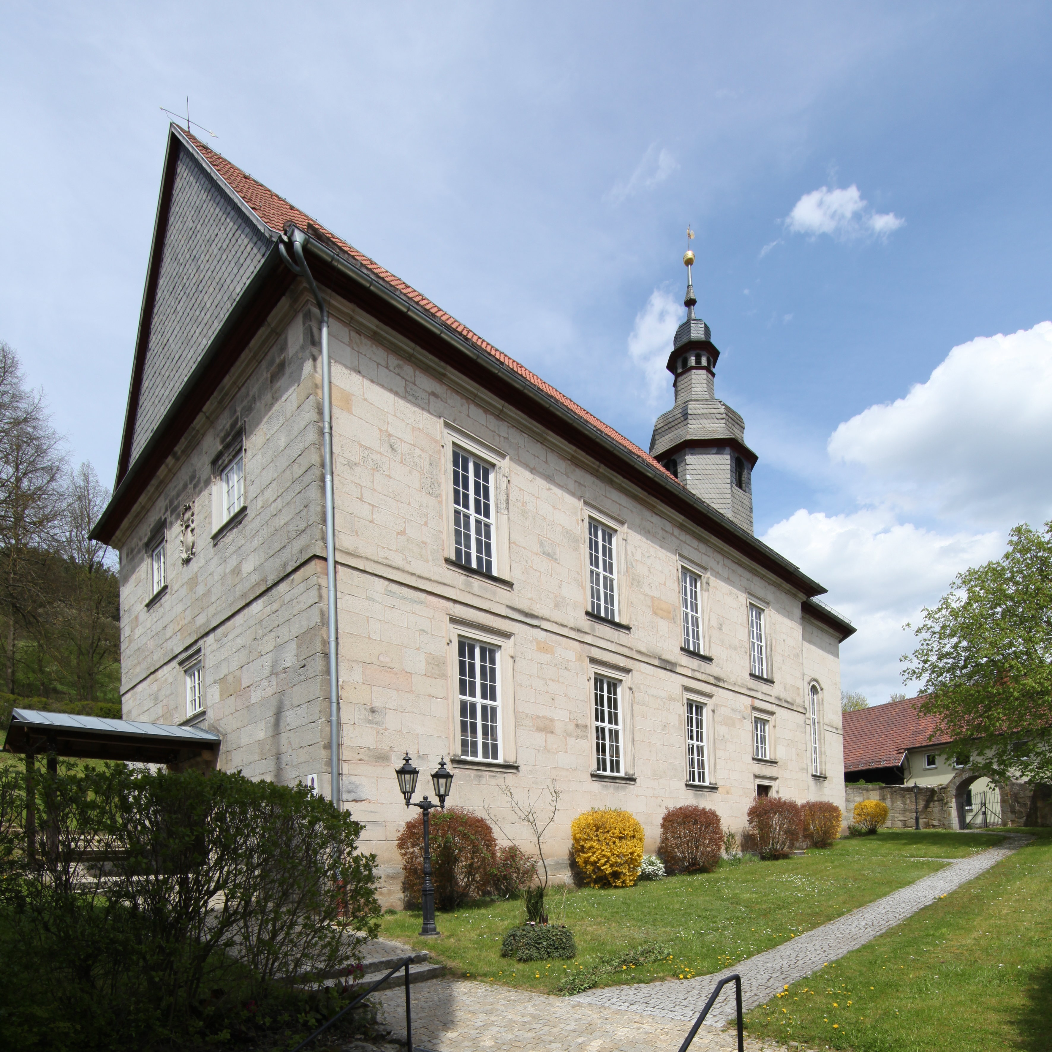 Evangelische Matthäuskirche, Gestungshausen